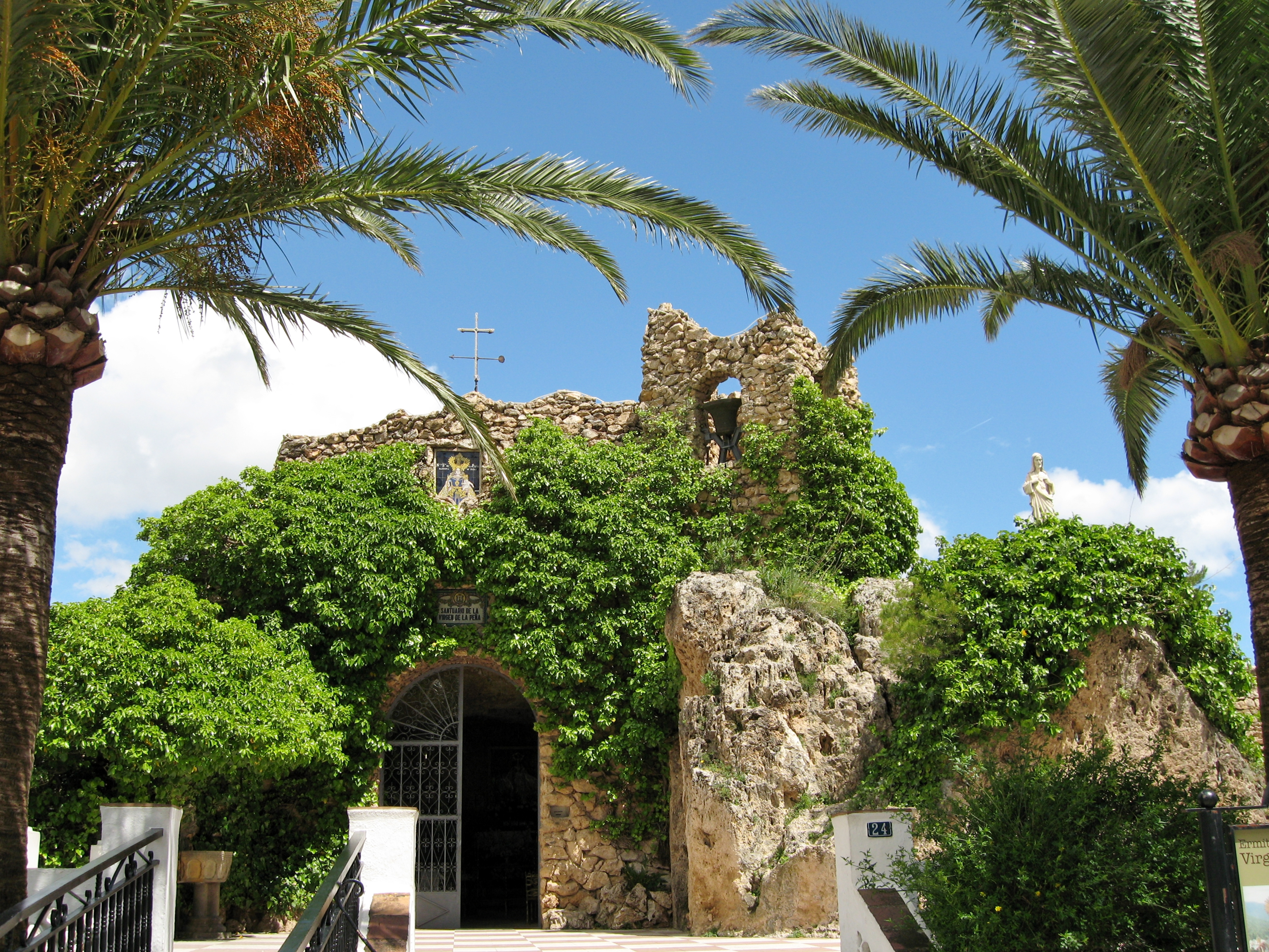 Ermita de la Virgen de la Peña, Mijas, Provinz Málaga, Andalusien, Spanien